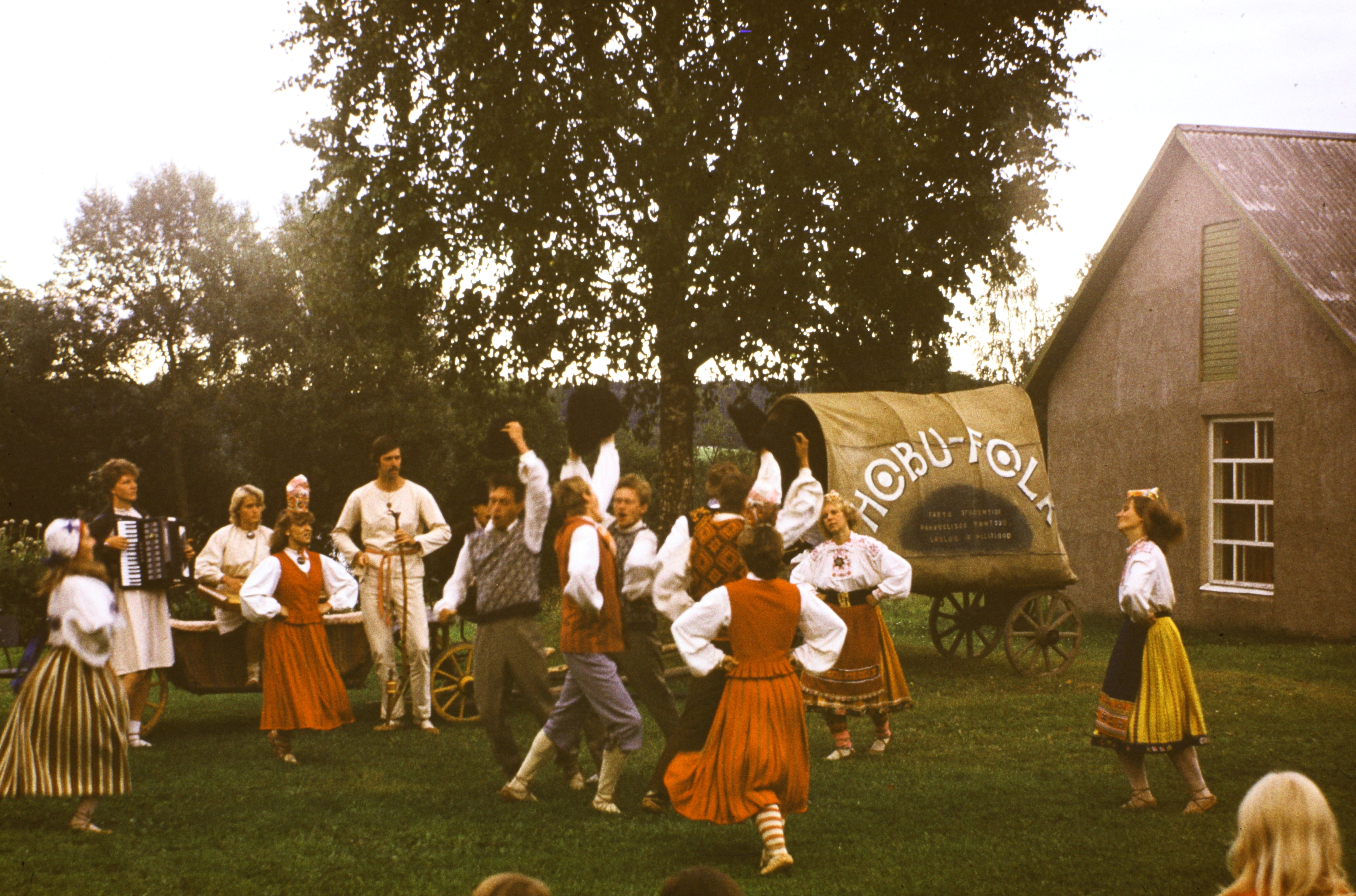 TRÜ RKA tantsijad 1984. aastal Hobu folgil.